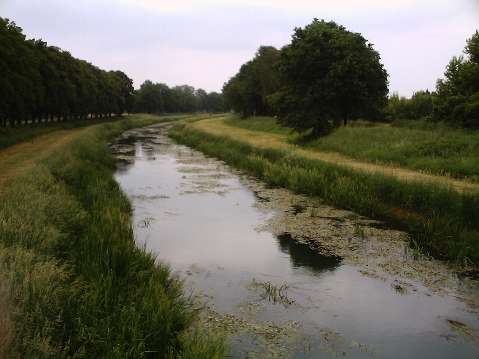 Der Fluß "Schwarze Elster" in Elsterwerda